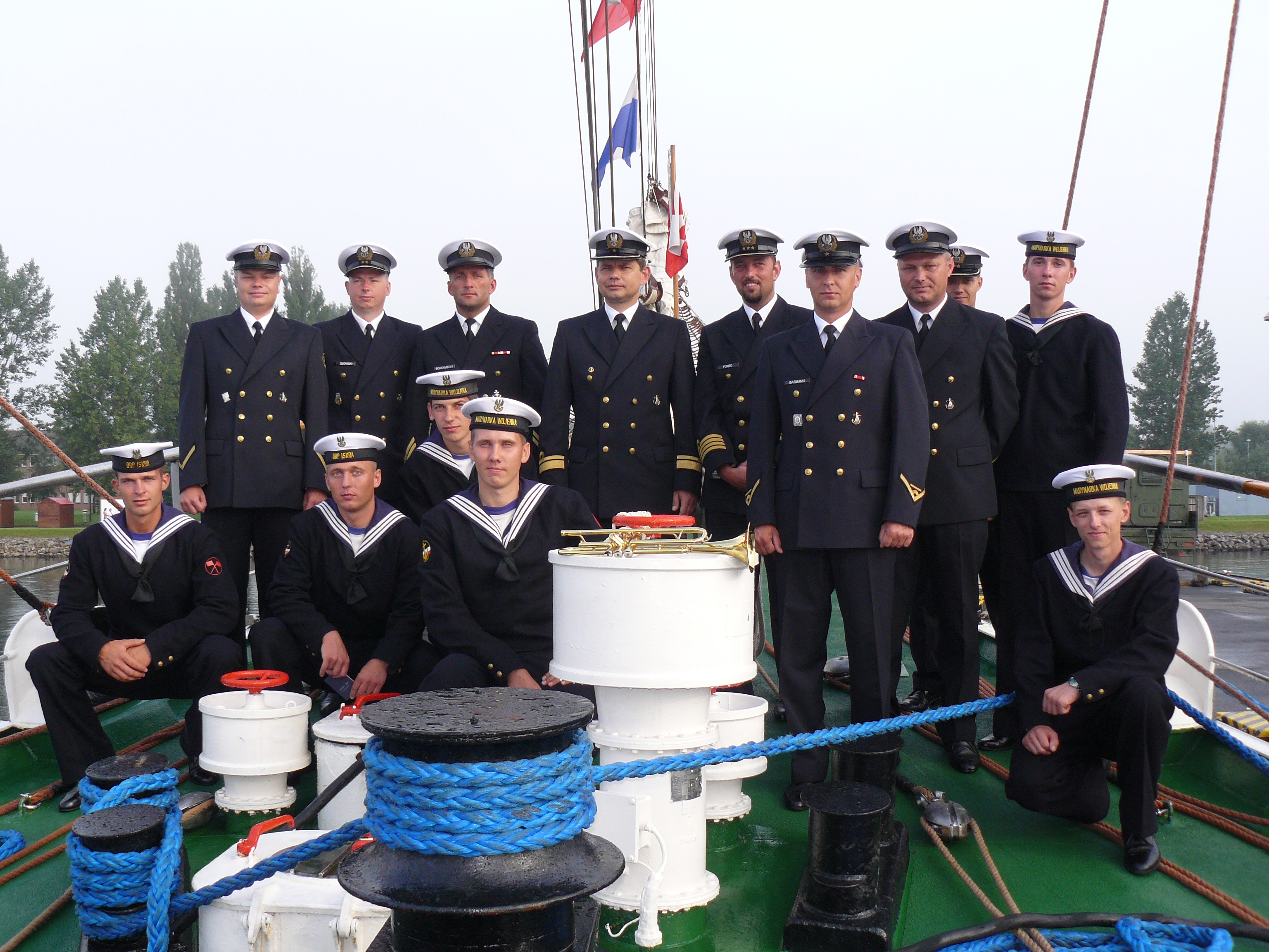 Załoga ORP Iskra - 25 Podniesienie Bandery w Rostoku.